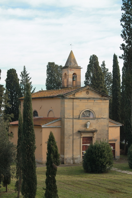 Foto scatttata alla Cappella Gentilizia di Villa Carmignani